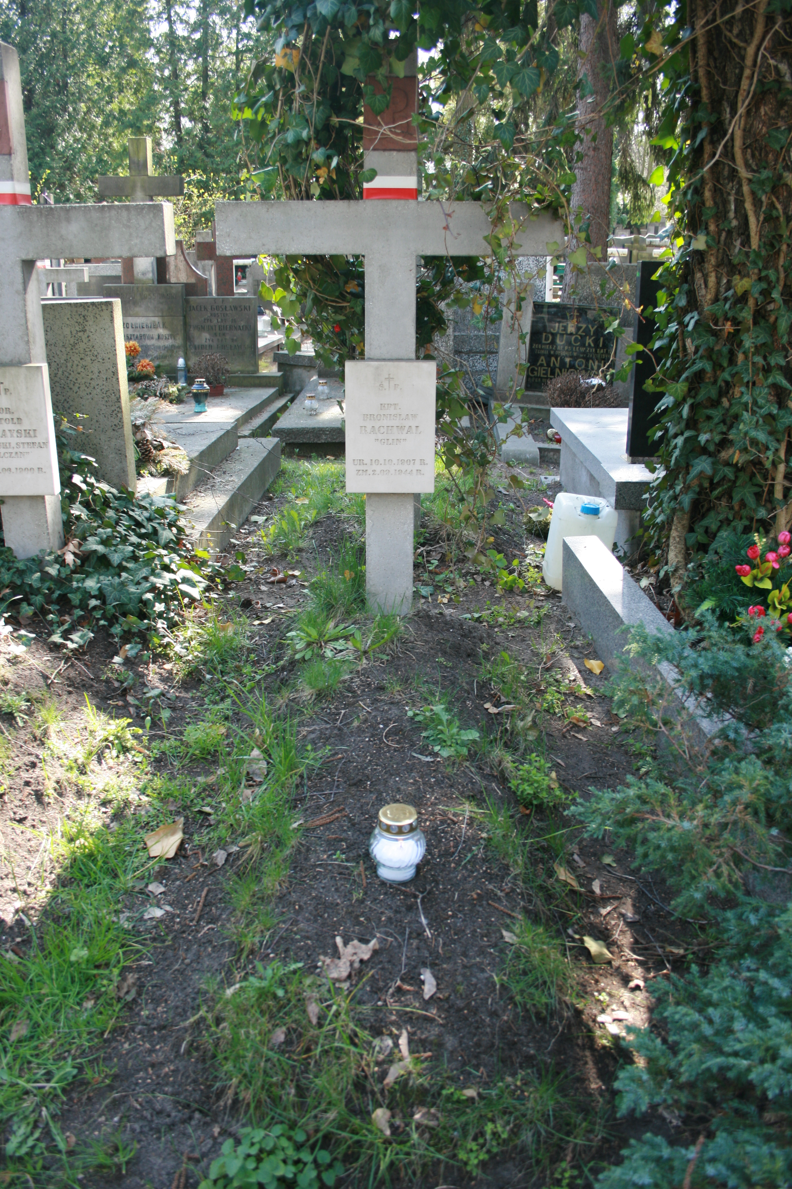 Grób na Powązkach Wojskowych w Warszawie